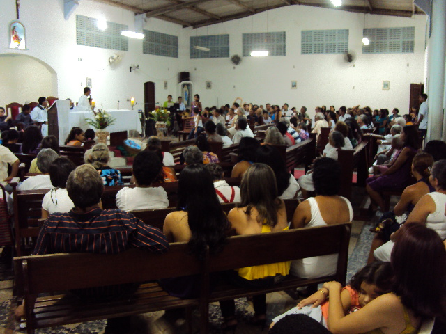 Missa na Igreja de Nossa Senhora das Graças. João Pessoa - PB.